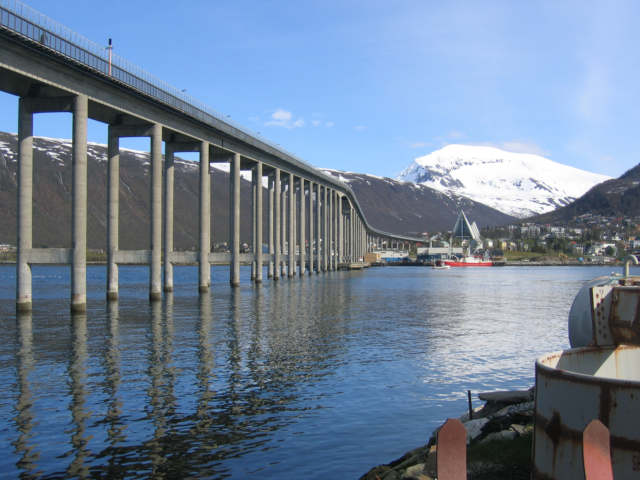 Tromsø Tromsøsundbrua Tromsdalstind Ishavskatedralen.